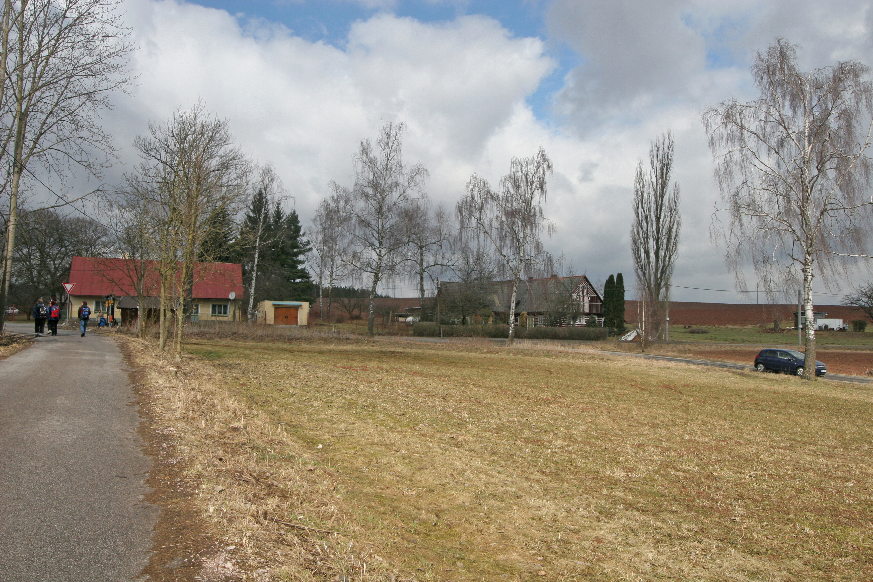 Klepanda čp. 63 a 31